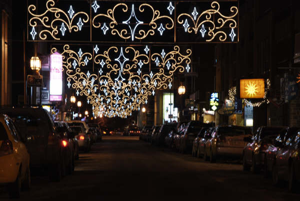 Illumination rue Notre-Dame, Joliette, région Lanaudière Québec